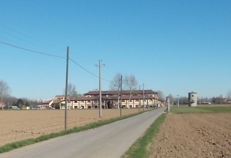 La cascina Radine si trova nel parco del Roccolo ad Arluno